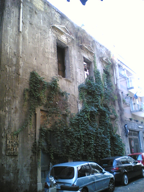 Chiesa di Santa Maria del Monte dei Poveri (Napoli)